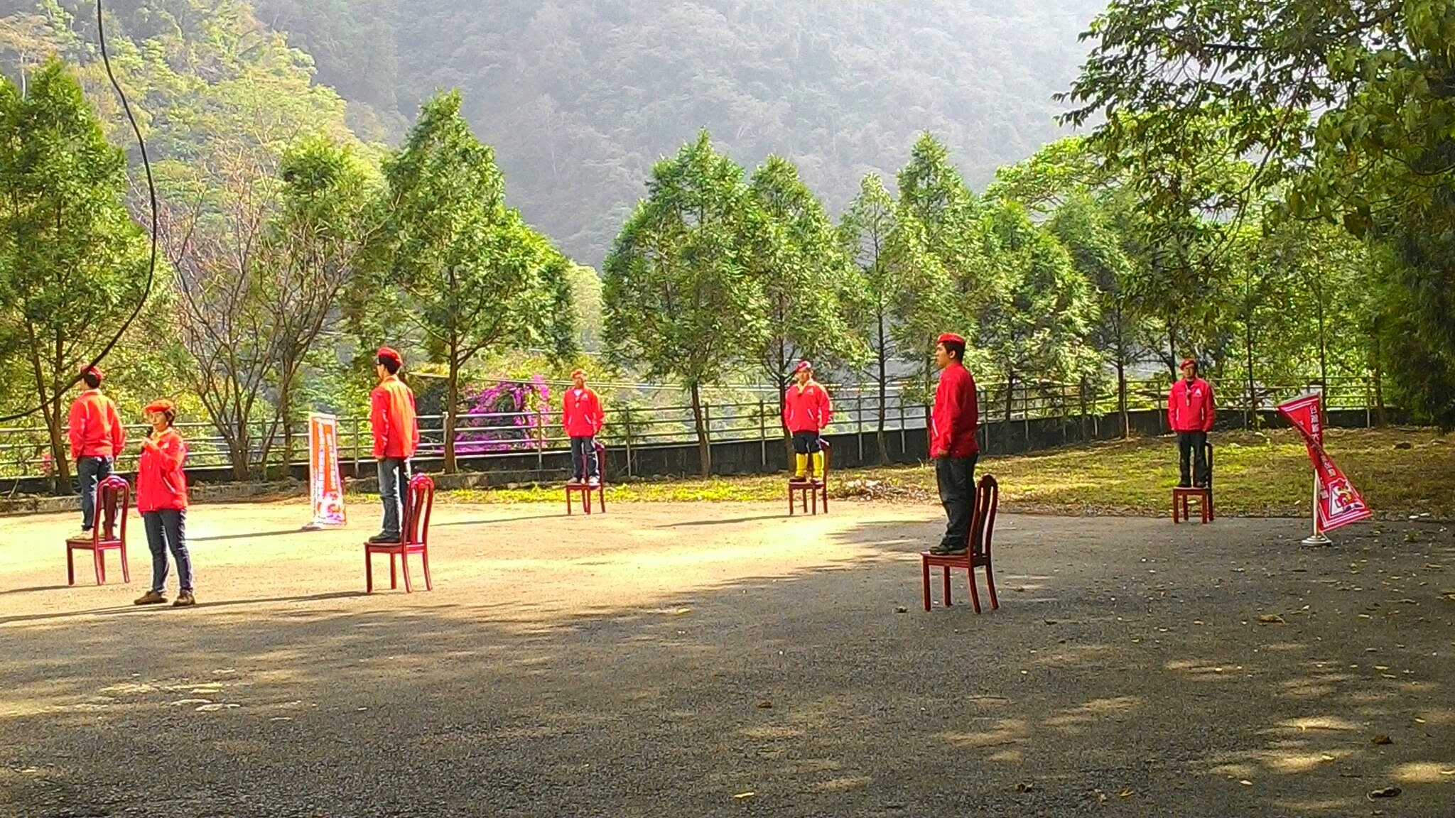 臺灣省大專青年服務協會46期山野訓練於2014年12月12日於谷關舉行，本照片為最後一天的自我突破活動，紅衣服務員蓄勢待發。